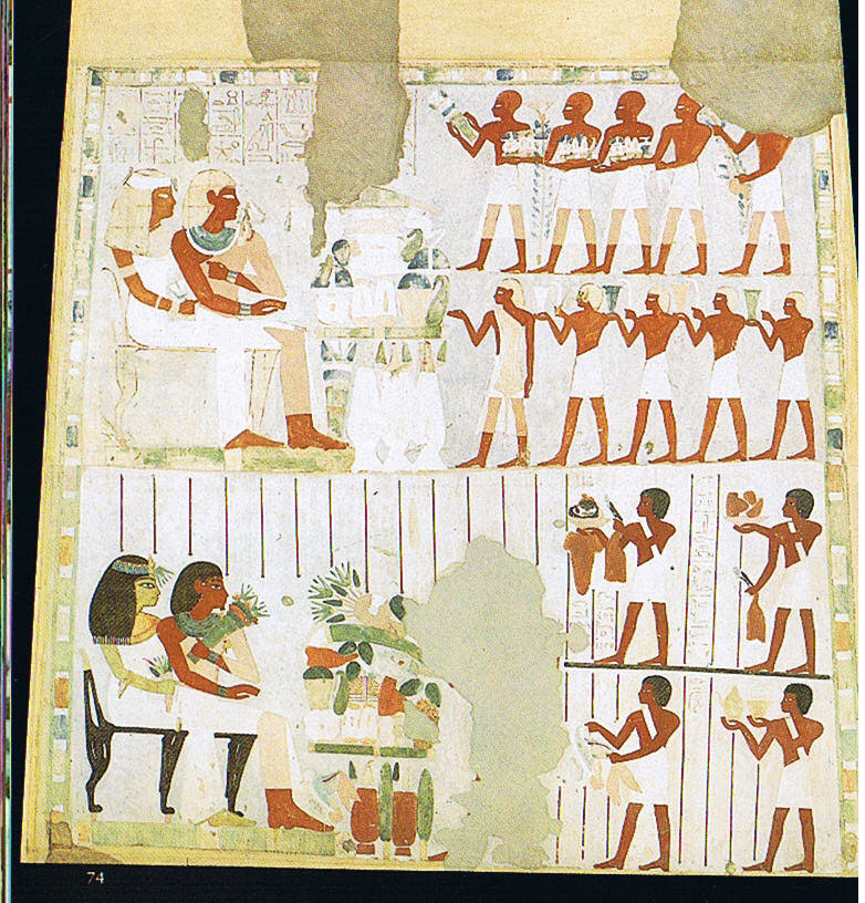 Opferszene, sitzend zweimal Nacht und Taui